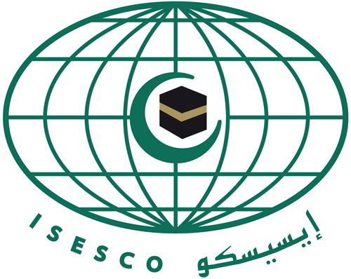 شعار المنظمة